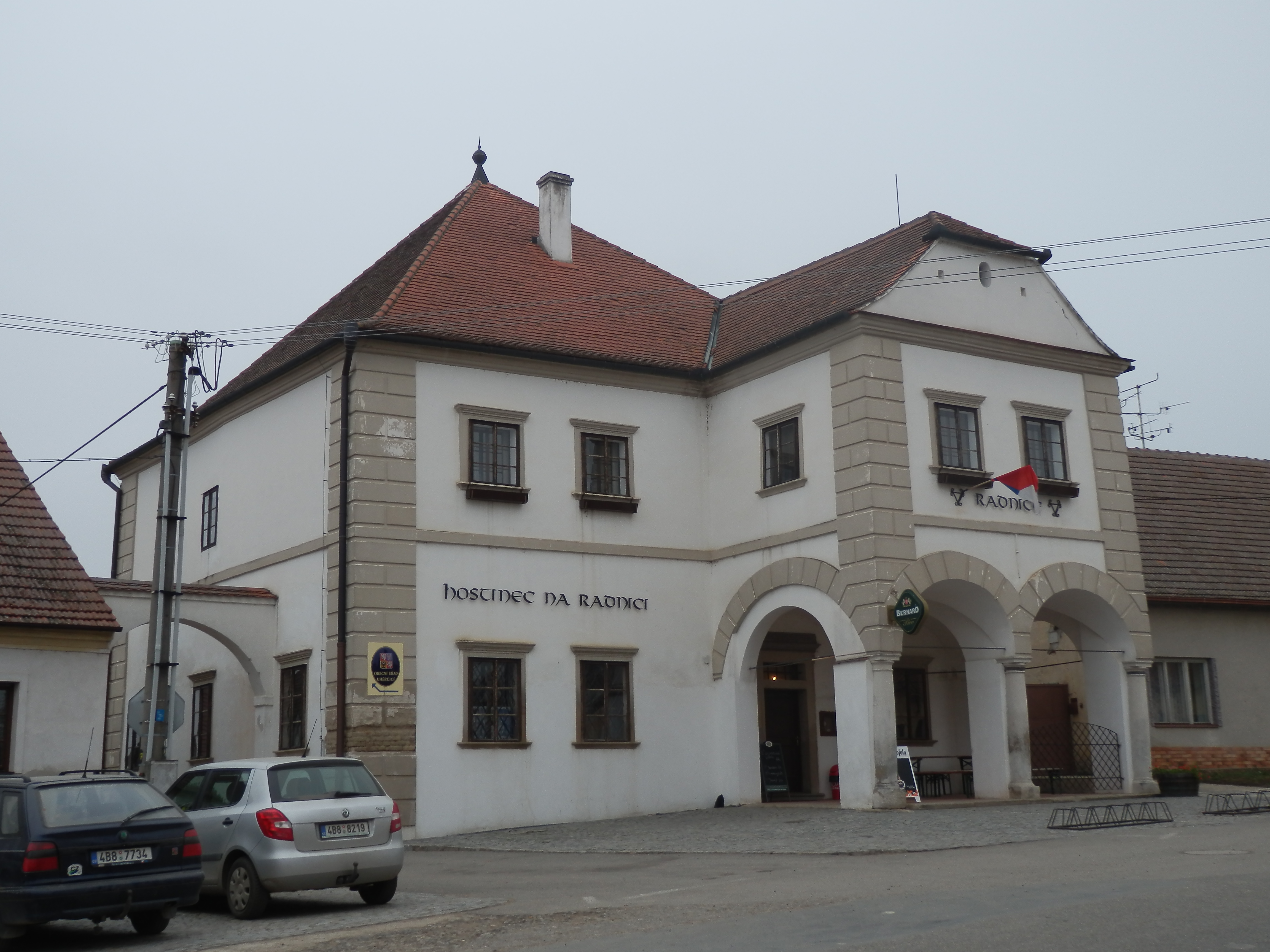 Hospoda (Uherčice), Uherčice 32